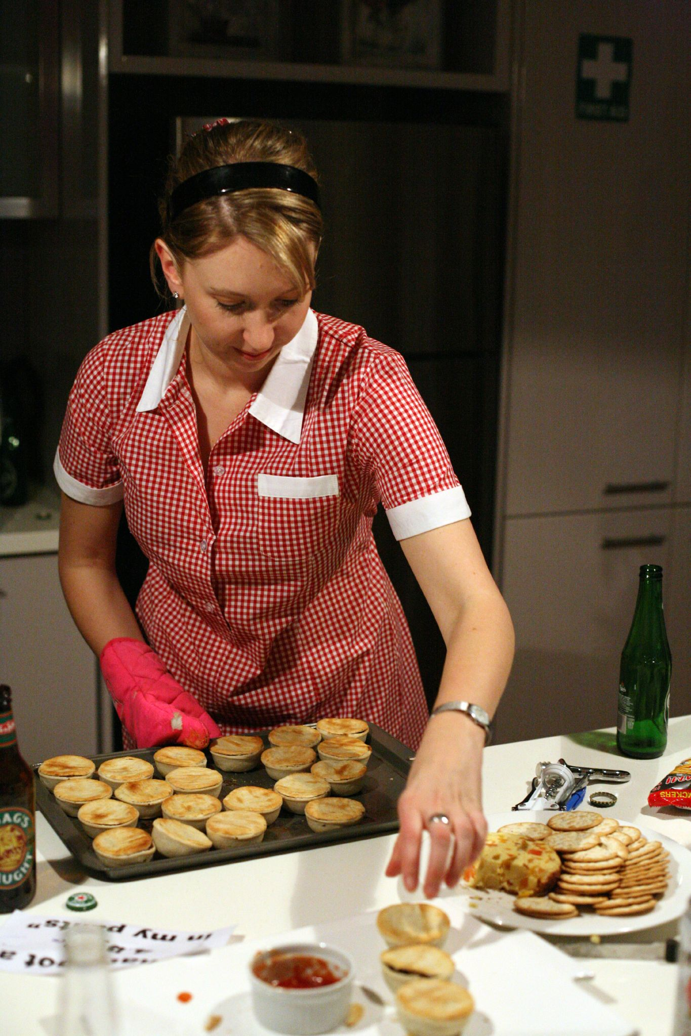 Woman baking coookies